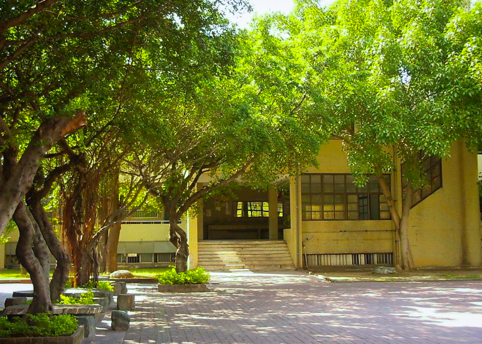 2016廁所改建之前的武陵高中志清樓